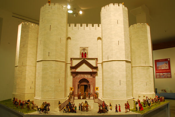 Modell Castel del Monte in 1:25